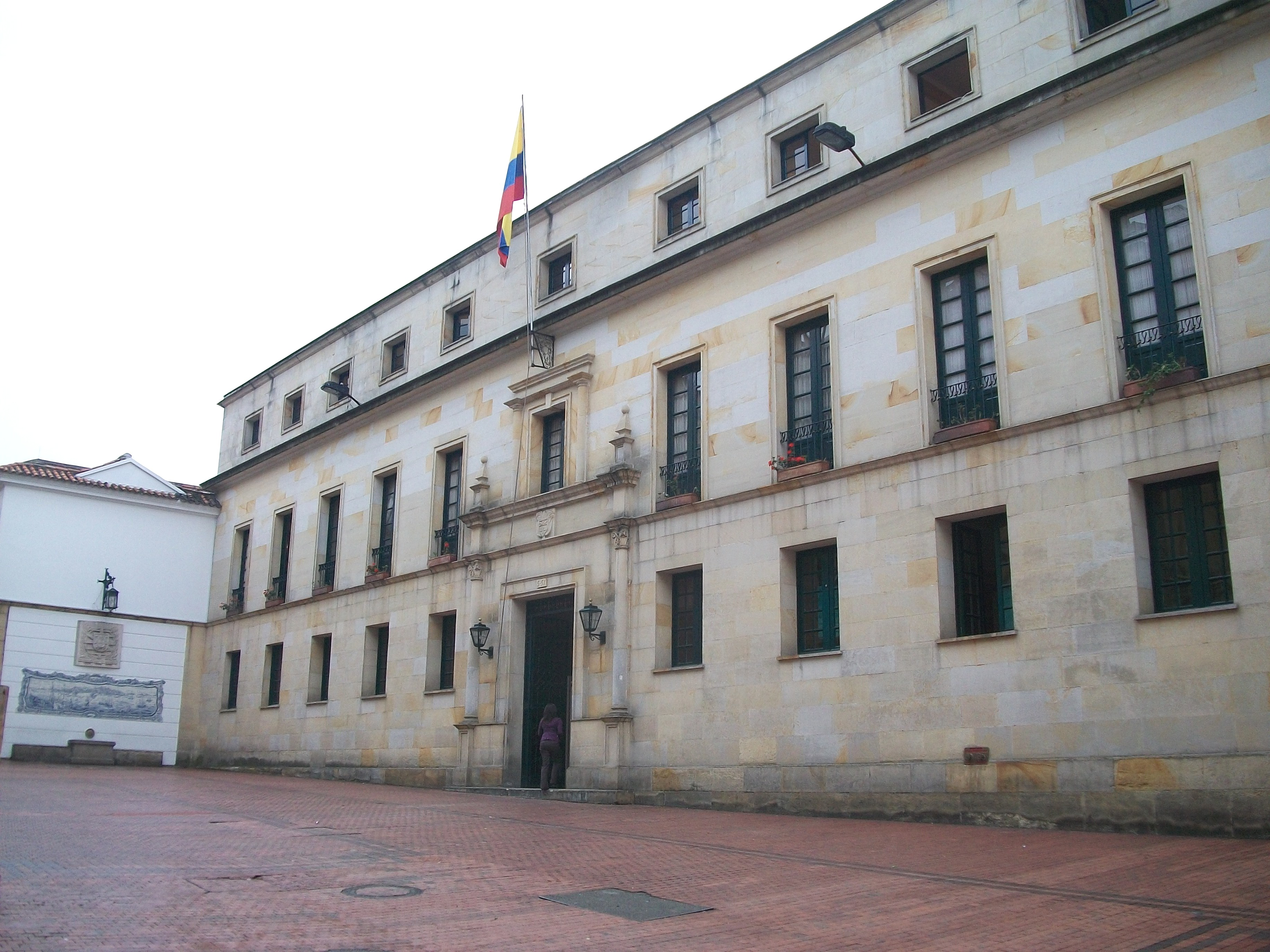 Palacio de San Carlos, Calle 10 con Carrera 5. La Candelaria.